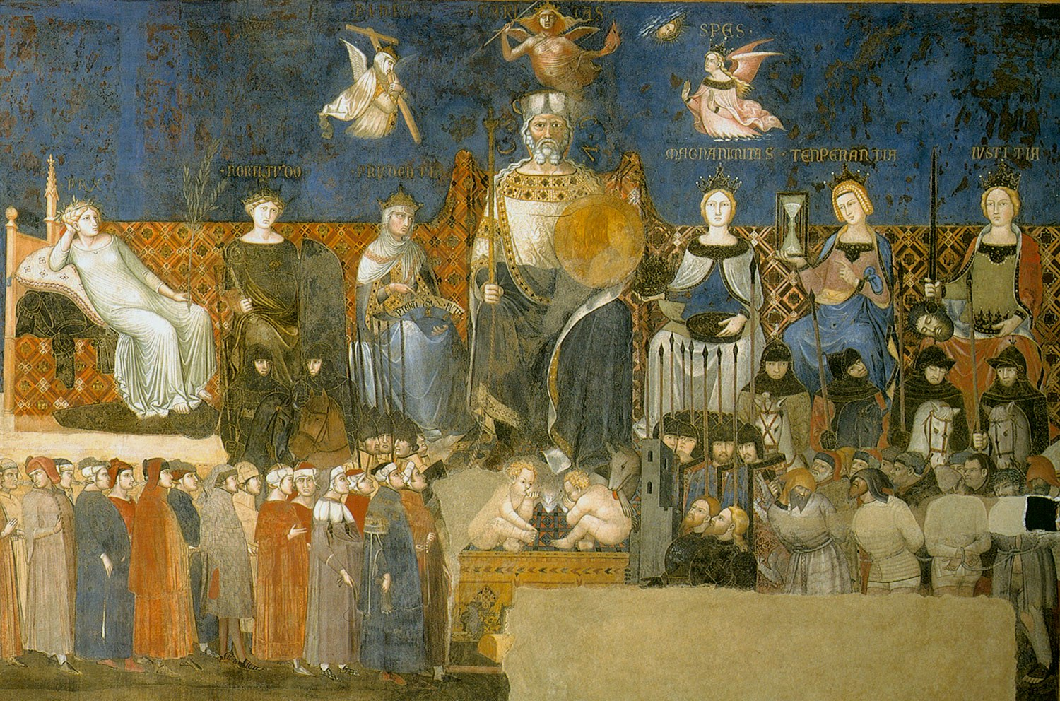 Lorenzetti_amb._good_government169_det.jpg